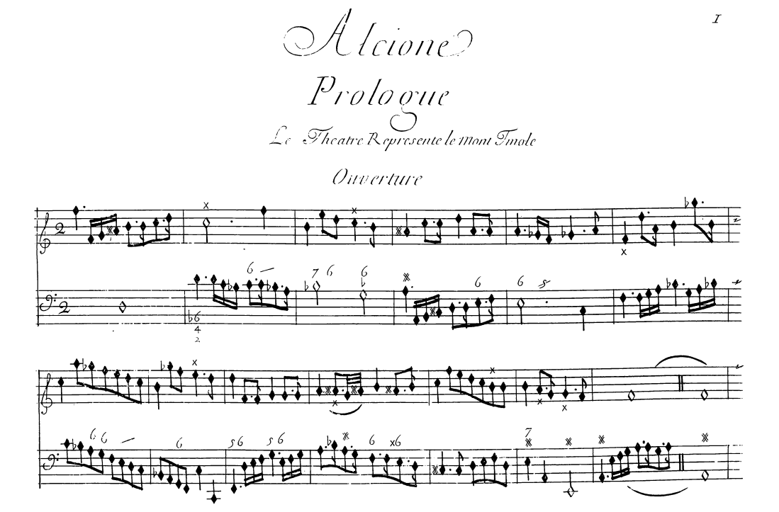 Début de l'ouverture de l'opéra Alcyone (1706), de Marin Marais.